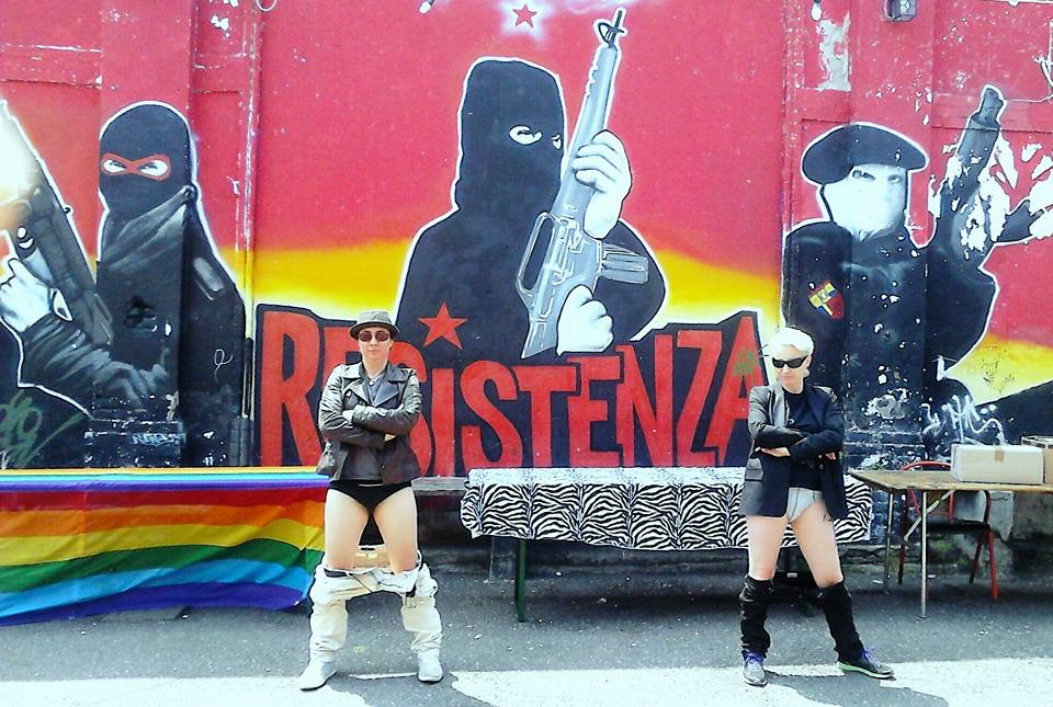 La collettiva Zarra Bonheur